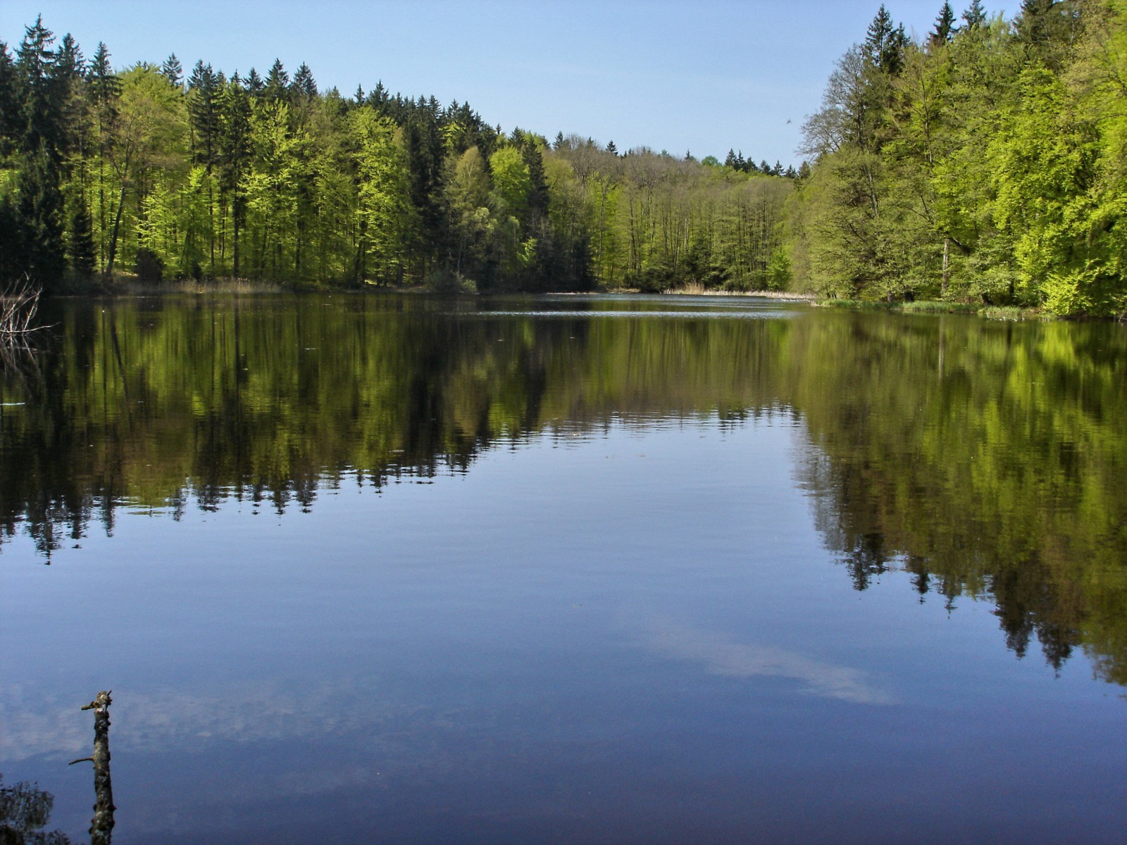 Langmoosweiher im Altdorfer Wald (Gemeinde Baienfurt)